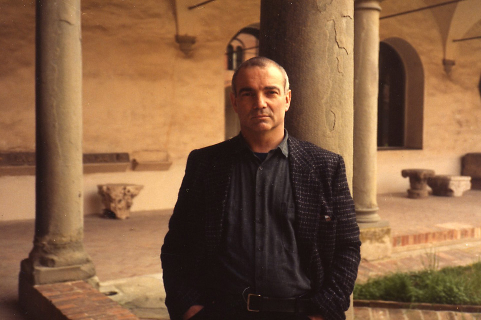 David D. Lauer 1983 in Florenz